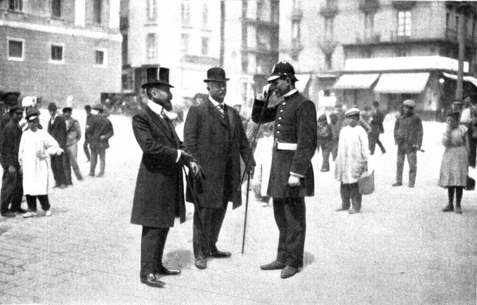 Esperantistoj Carlo Bourlet kaj Félicien Menu de Ménil alparolas esperantiston-urbgvardianon sur la Placo de Konstitucio dum UK en Barcelono, 1909.